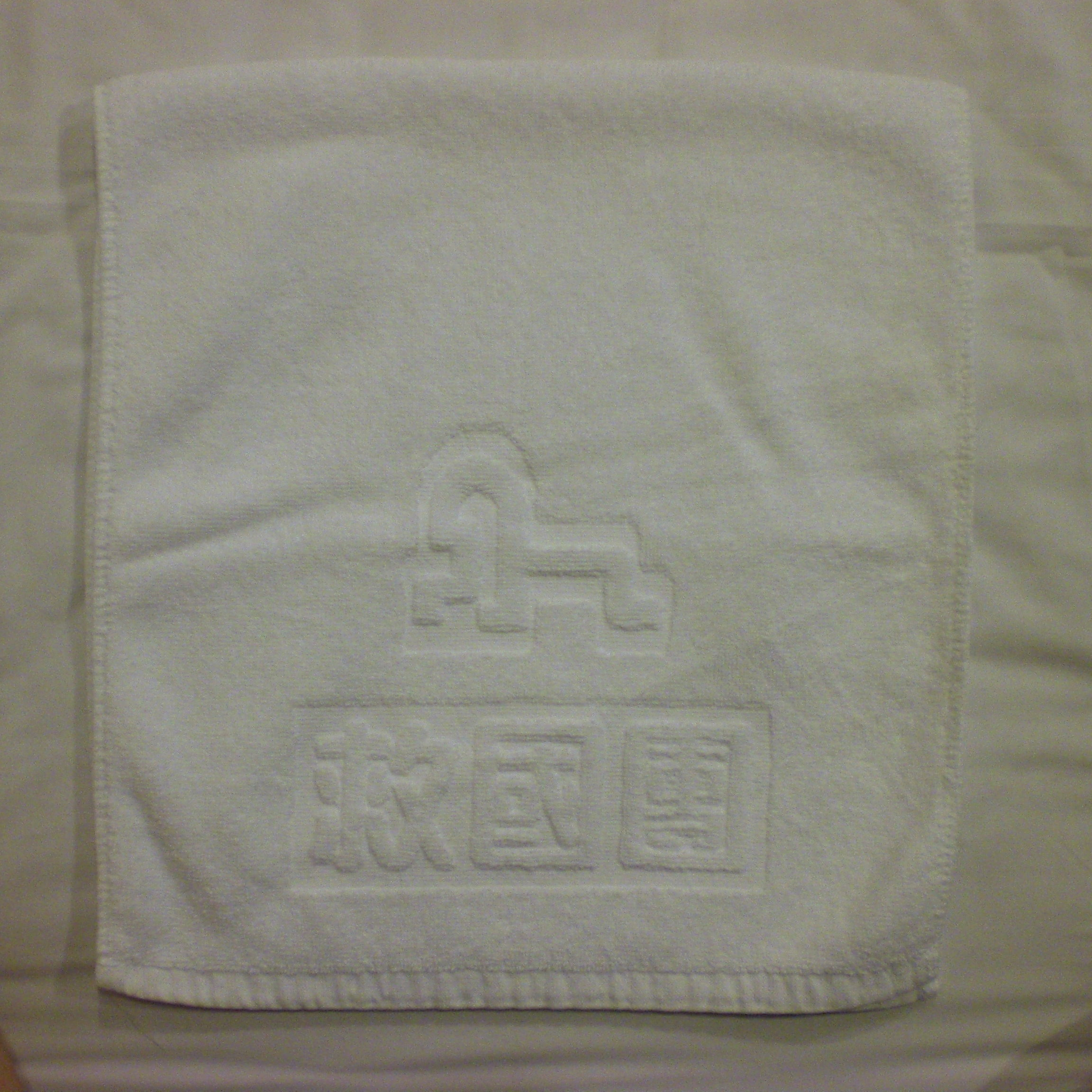 中國青年救國團墾丁青年活動中心客房浴巾